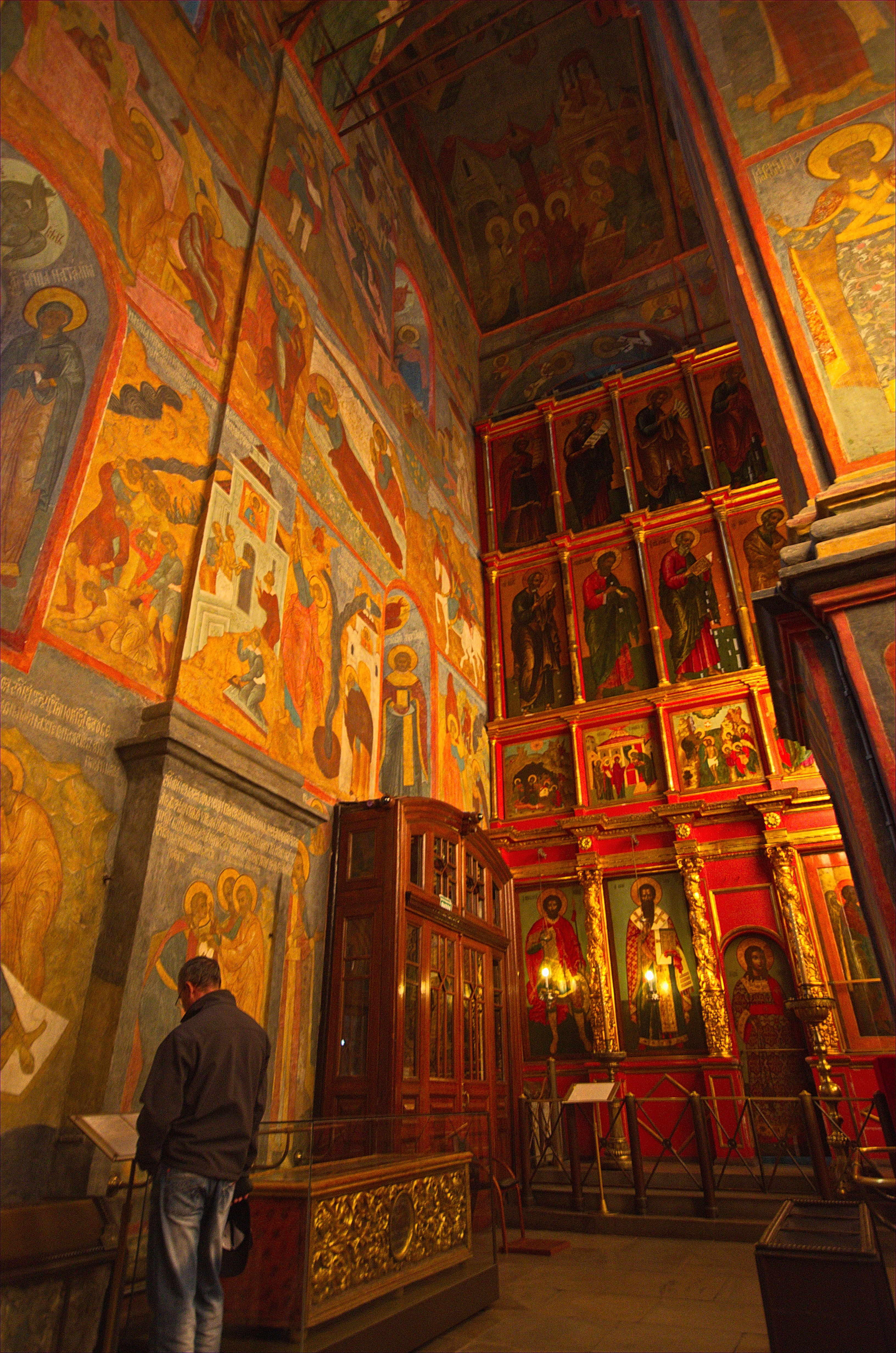 0995 - Moskau 2015 - Kreml